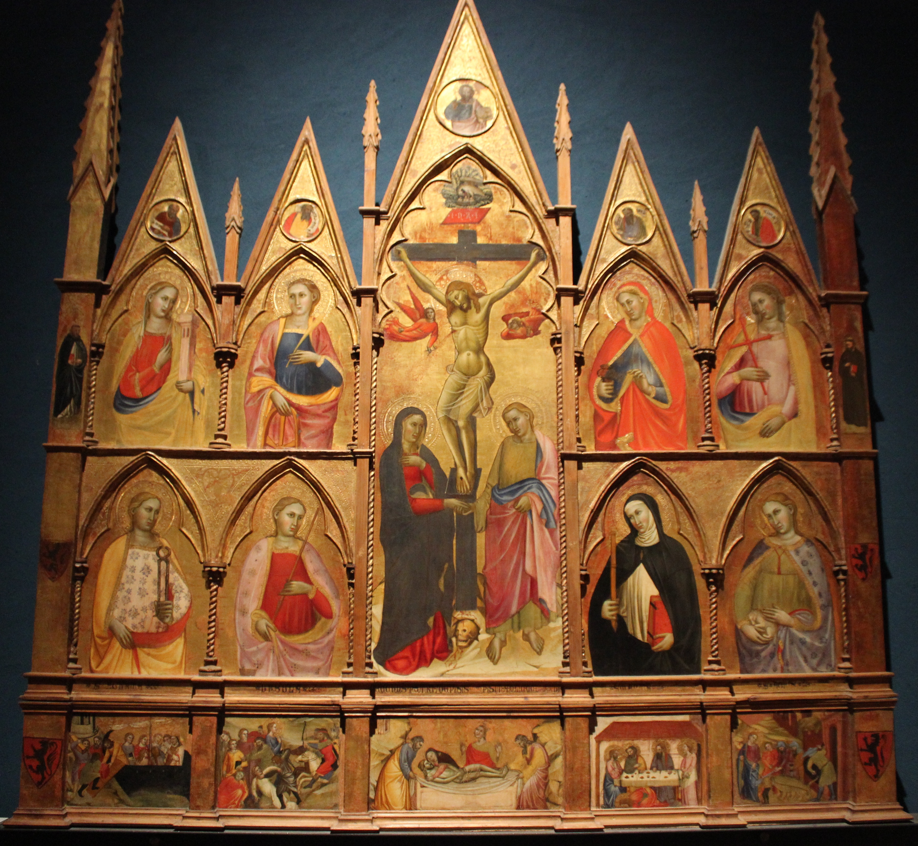 Cecco di Pietro, políptico de 1386. Pisa, Museo di San Matteo.